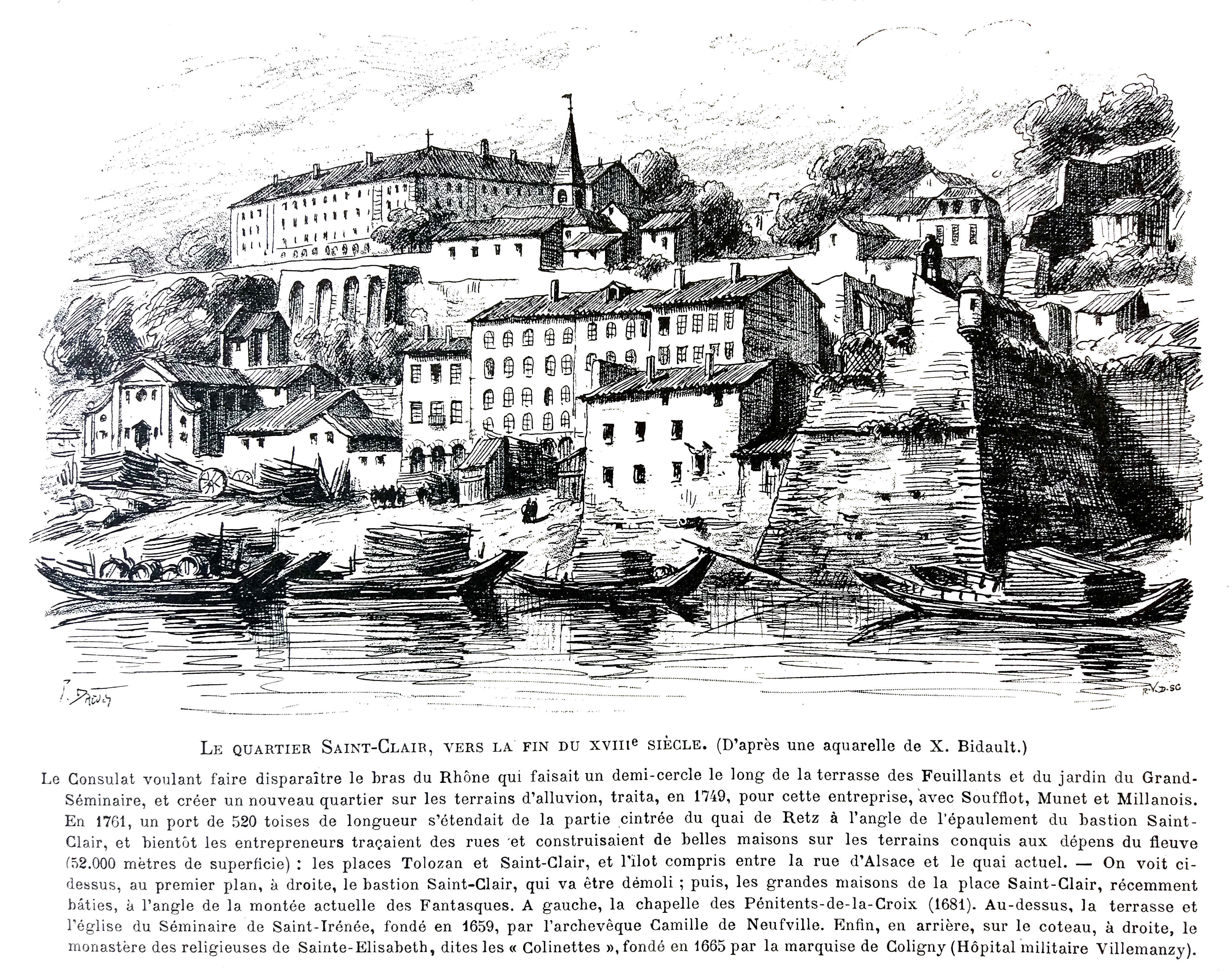 Livre Le Lyon de nos pères, Emmanuel Vingtrinier et Joannès Drevet, 1901, page 155 (gravure Rougeron-Vignerot-Demoulin) : le quartier Saint-Clair, vers la fin du XVIIIe siècle. (D'après une aquarelle de X. Bidault.). Bibliothèque municipale de Lyon.